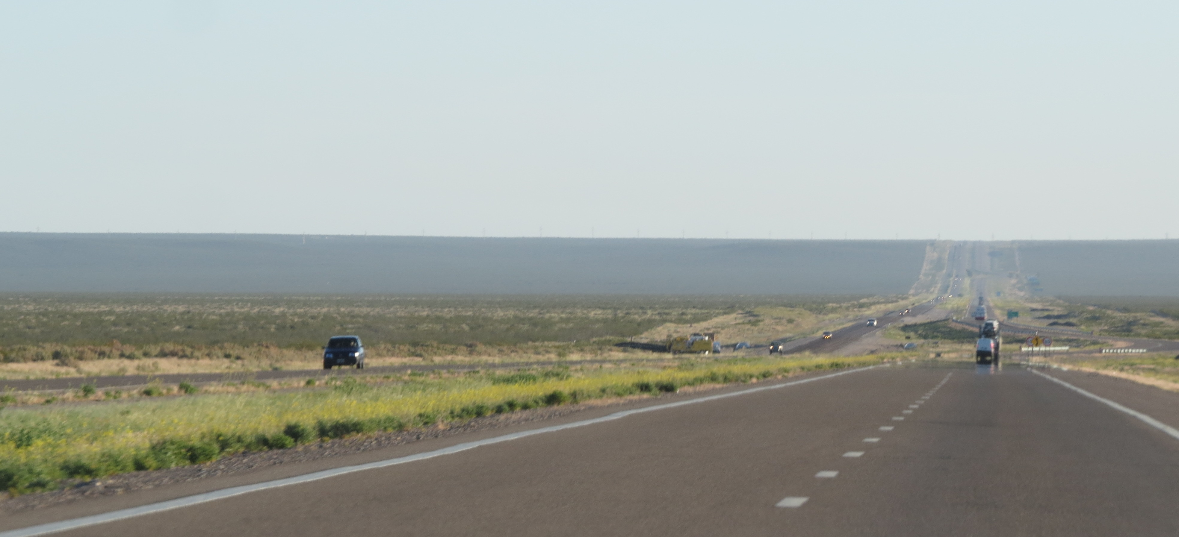 Vista de la ruta 3 entre Trelew y Puerto Madryn